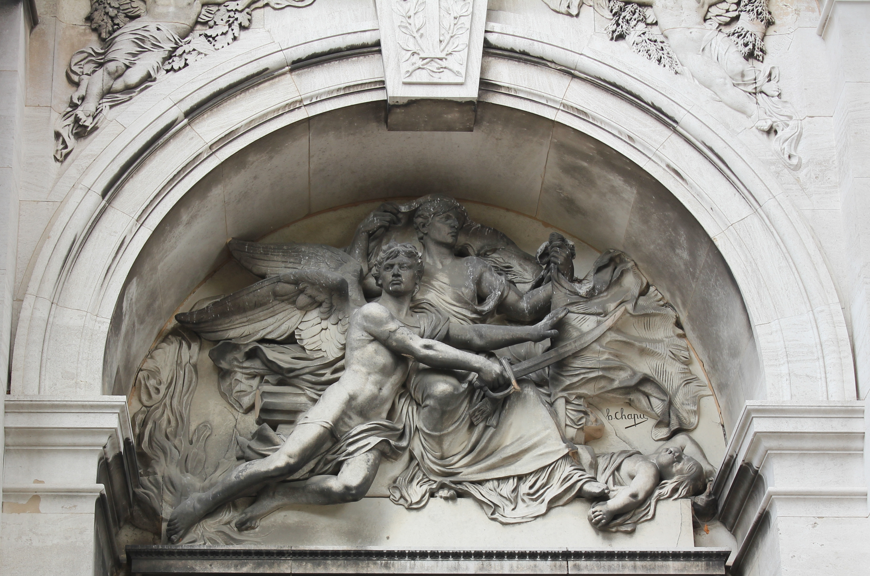 Sépulture de la famille Thiers dont Adolphe Thiers (1797-1877). Monument funéraire de l'architecte Aldrophe, orné d'un relief en marbre représentant le Patriotisme de Chapu et, à l'intérieur, d'une statue représentant l'Immortalité de Mercié. Concession de 152m². Initialement Adolphe Thiers a été enterré dans la chapelle Dosne-Thiers, avenue des Acacias, près de la tombe d'Étienne-Renaud-Augustin Serres.